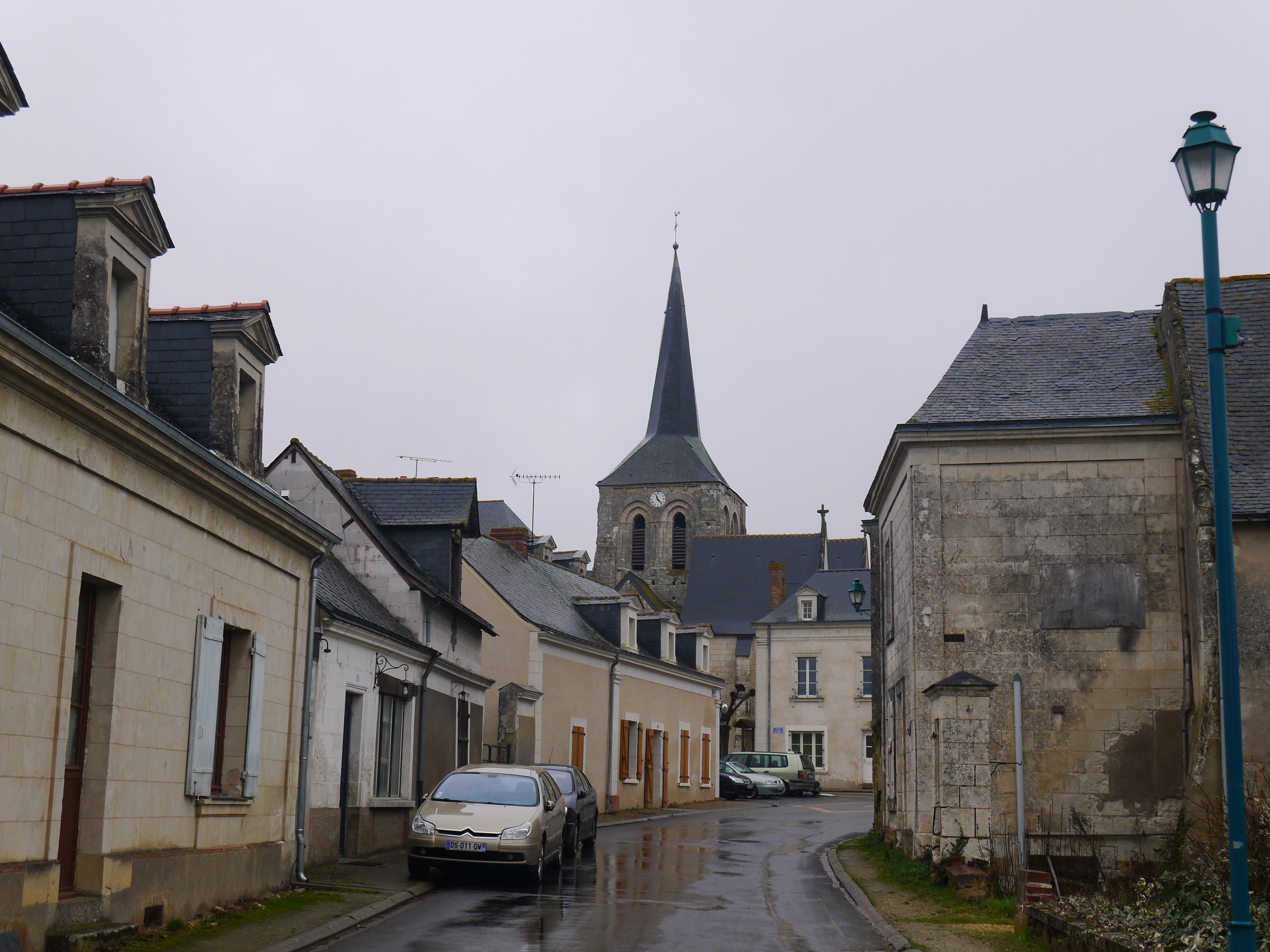 L'église Saint-Hilaire.